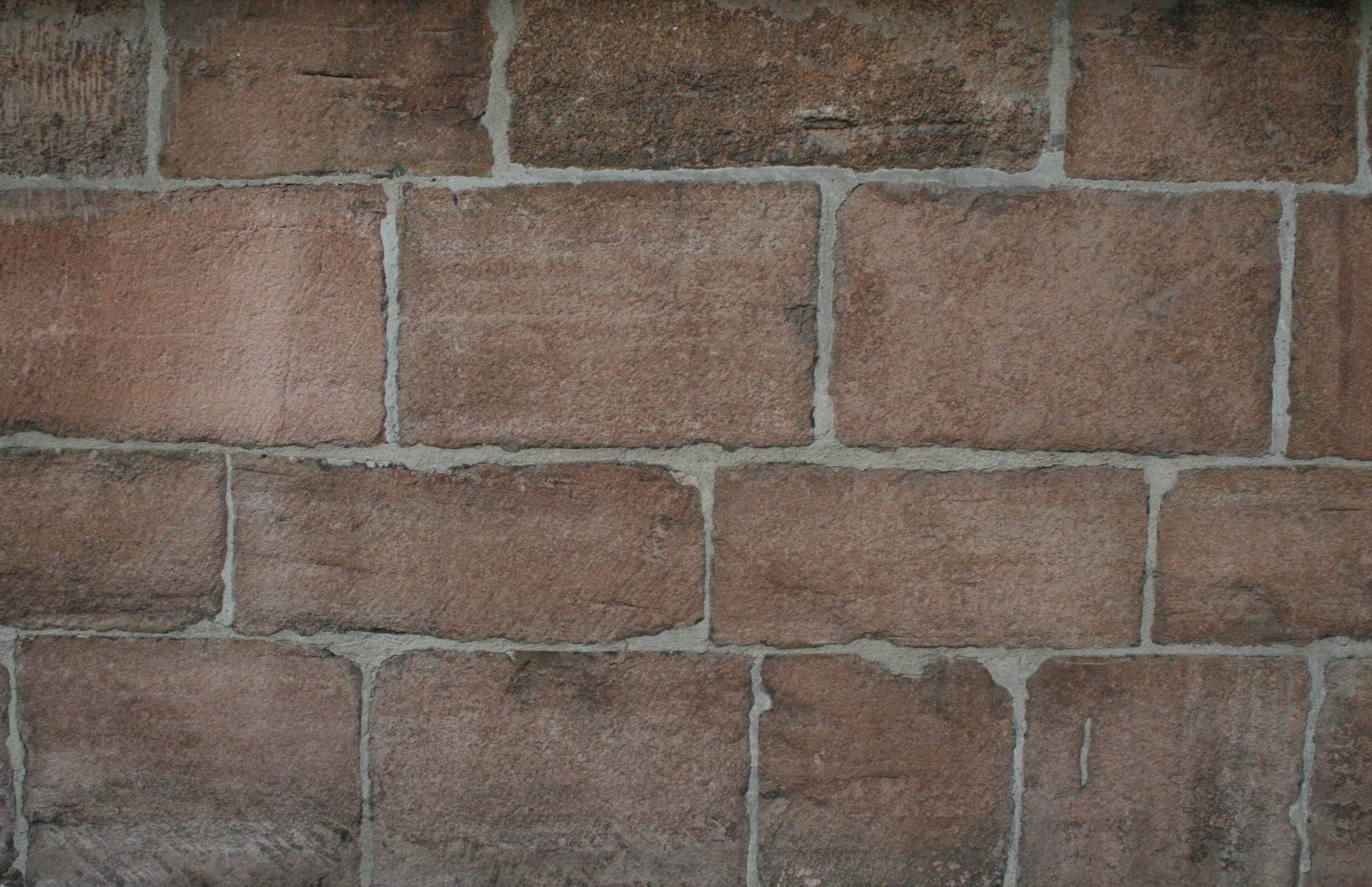 Quadermauerwerk aus Braunschweiger Rogenstein an der Martinikirche